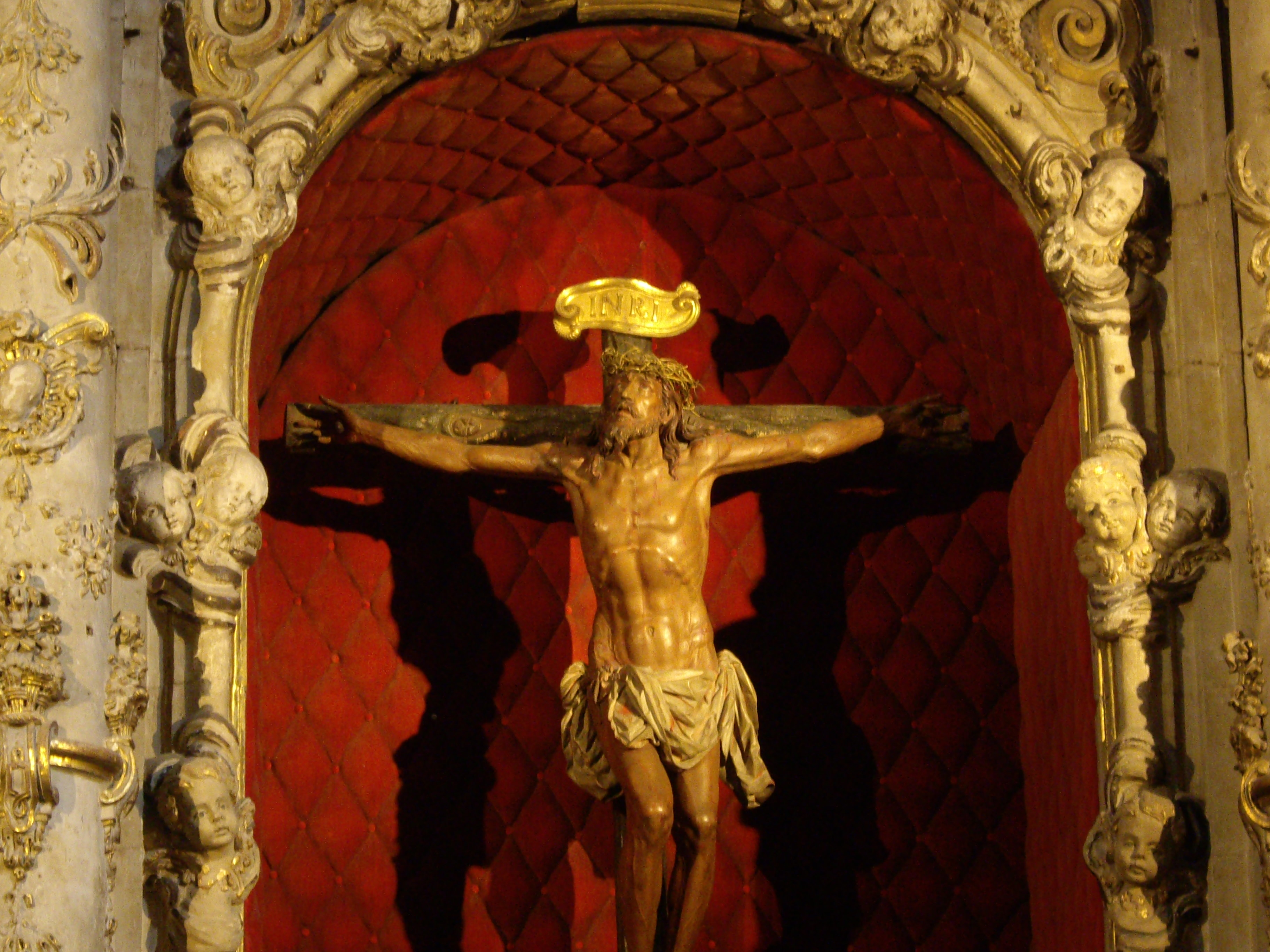 Cristo de la Agonía de Bernardo Pérez de Robles, 1671, propiedad de la V. O. T. Convento de San Francisco, Salamanca, España.